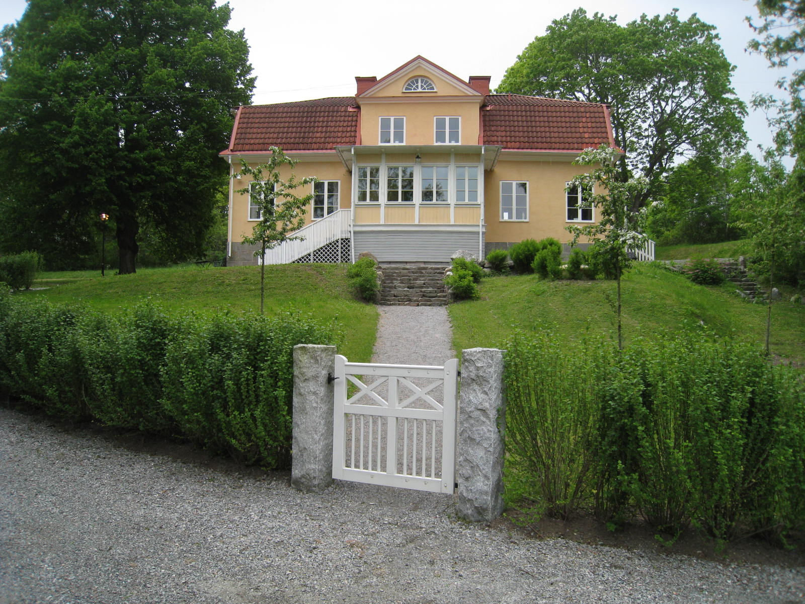 Görvälns slottspark i Järfälla kommun i Stockholms län. Bilden visar Villa Solbacka (eller Görvälns krog). Villa Solbackas äldsta delar är från 1600-talet. Görvälns krog fanns här ända fram till 1830-talet, på sommaren fungerade den som sjökrog för resande mellan Stockholm och Uppsala. Huset används nu som bostad.